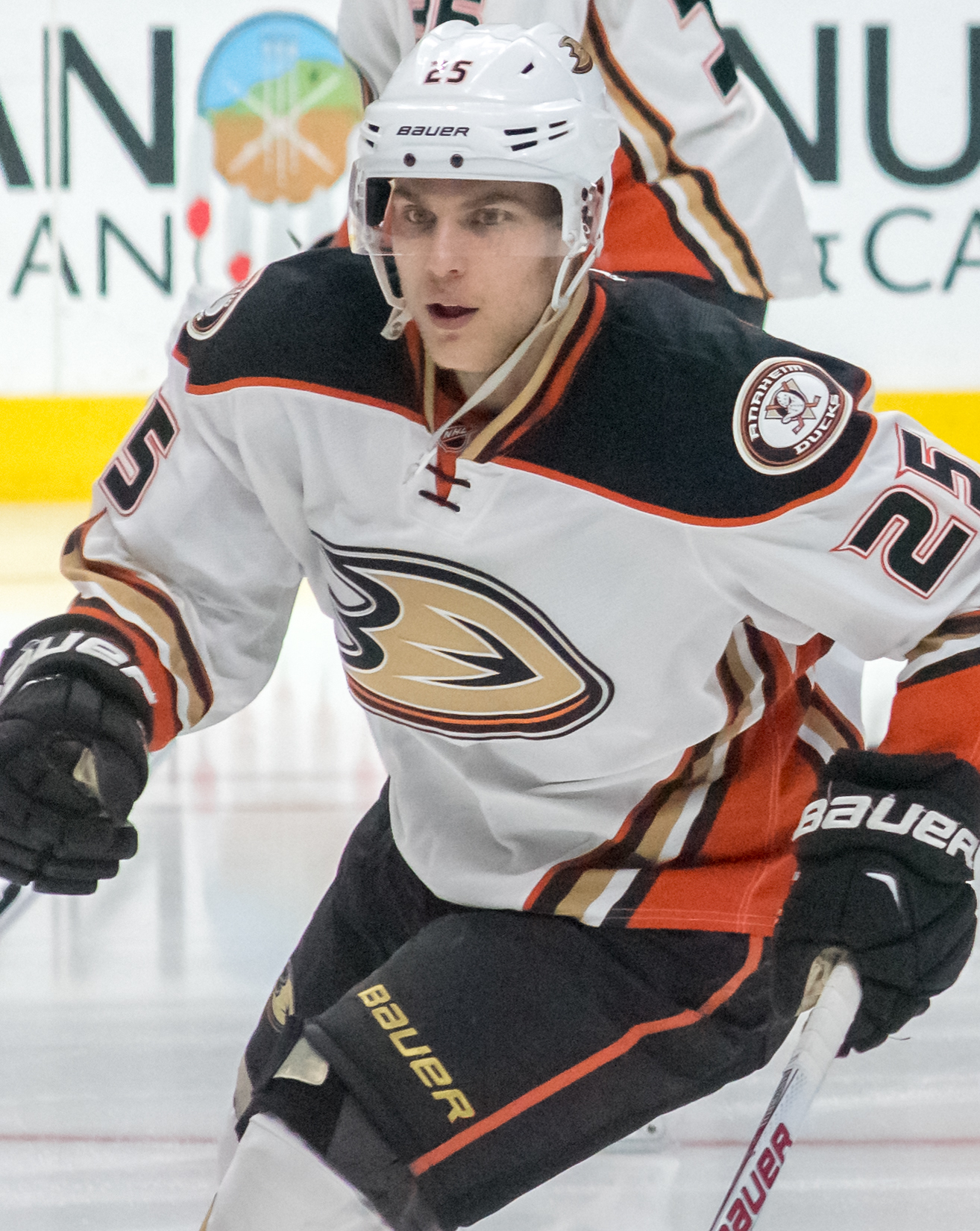 Michael Santorelli